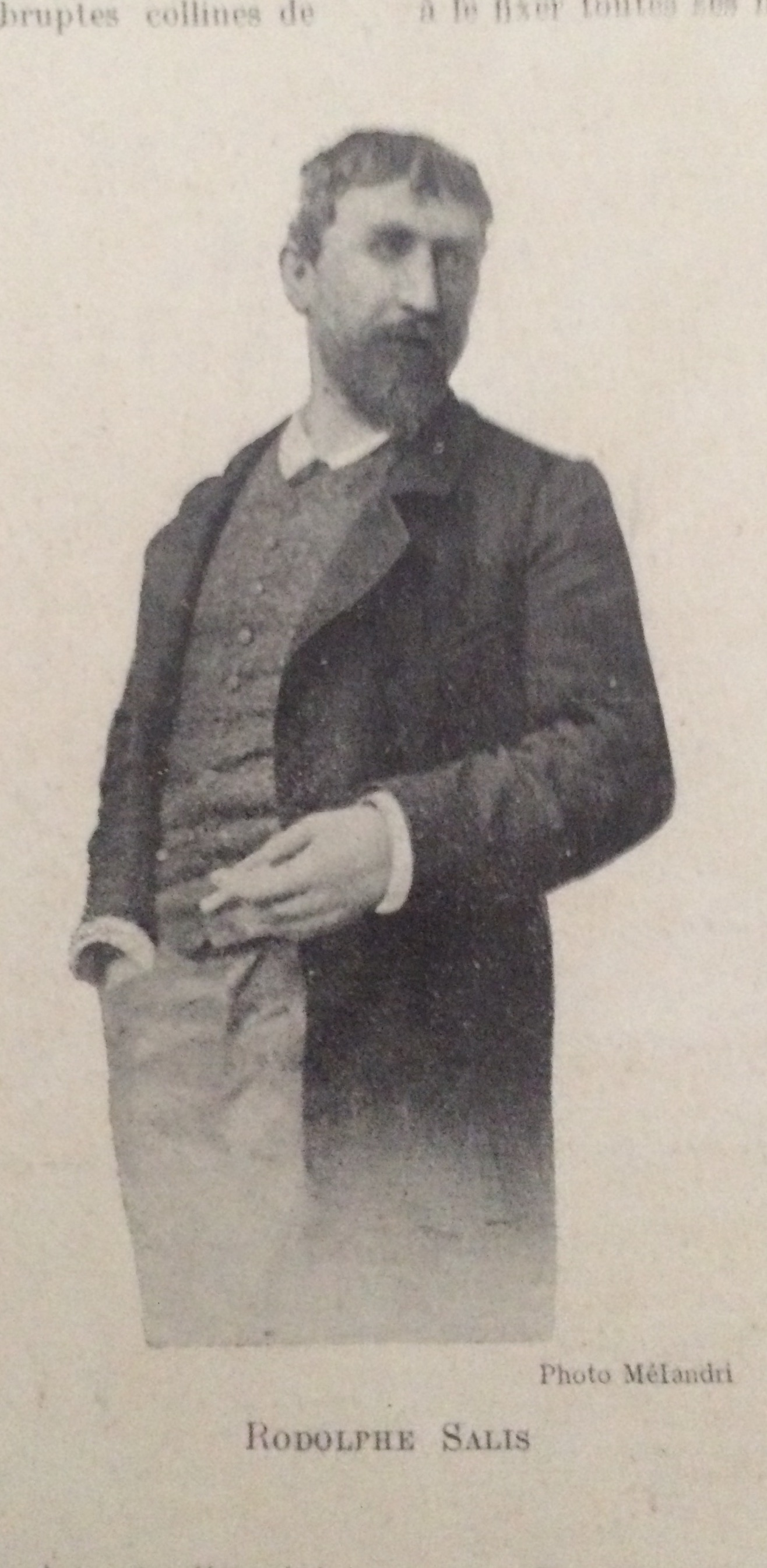 Photo parue dans la revue " La Musique pour tous" n°24 du 25 Juin 1907, consacrée à l'Histoire Mirifique du Chat Noir.